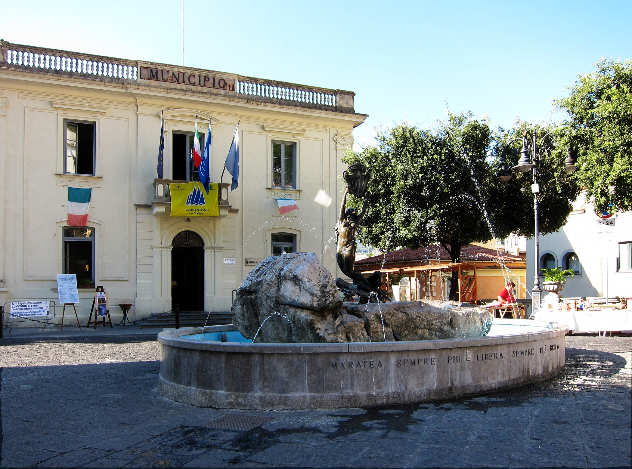 La mairie de Maratea (Basilicate).